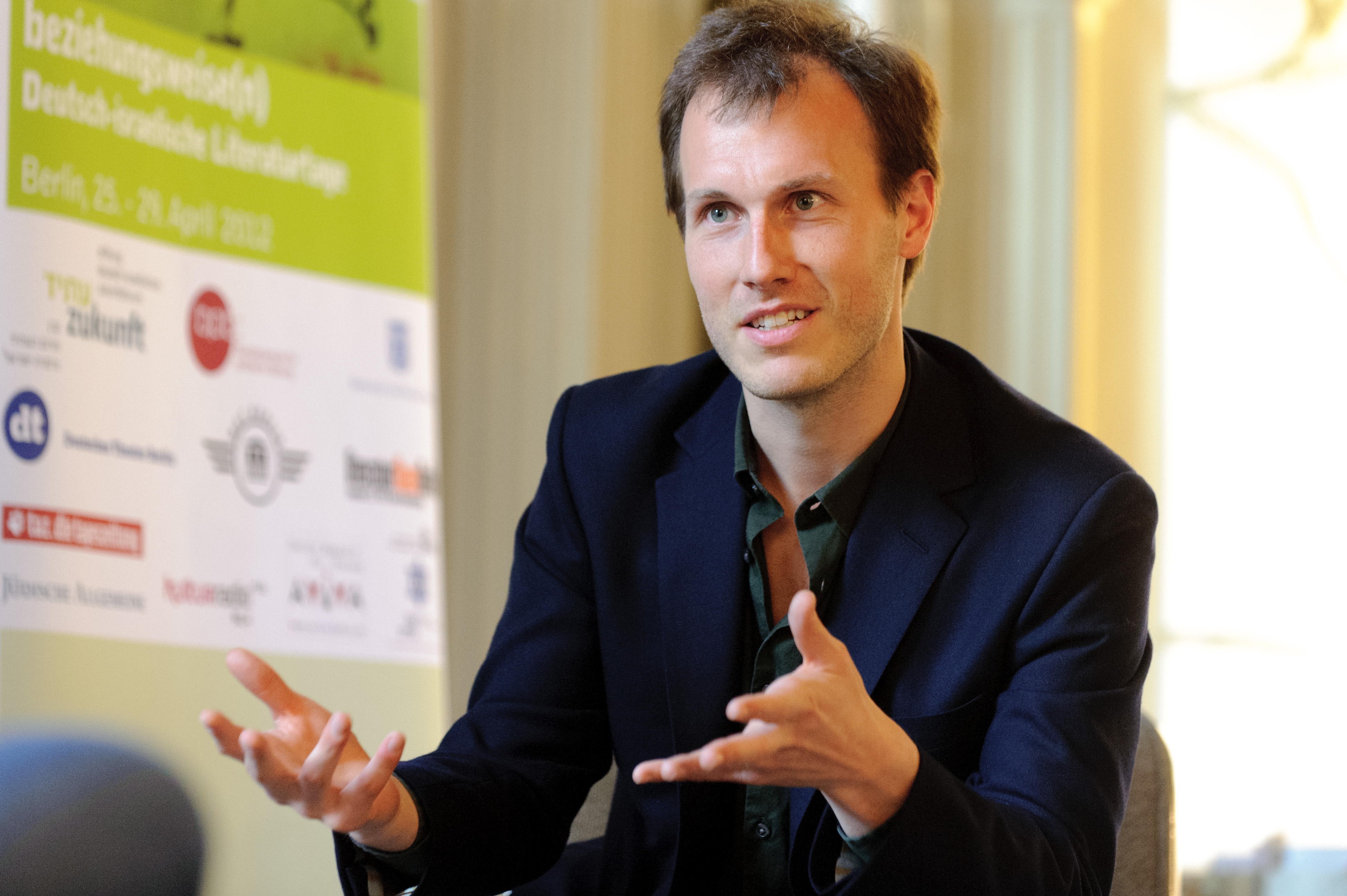 Christopher Kloeble (Schriftsteller) Deutsch-Israelische Literaturtage 2012 Die deutsch-israelischen Literaturtage - organisiert vom Goethe-Institut und der Heinrich-Böll-Stiftung - finden seit sechs Jahren abwechselnd in Berlin und in Tel Aviv statt. Neben Lesungen und Diskussionen gibt es im April auch Filme zu sehen. Abgeschlossen wird *beziehungsweise(n)* durch eine Diskussionsrunde, in der Aktivist/innen, Journalist/innen und Autor/innen über den Begriff der Solidarität, über gesellschaftliche Vorstellungen des Zusammenhalts und der sozialen Gerechtigkeit debattieren. Foto: Stephan Röhl